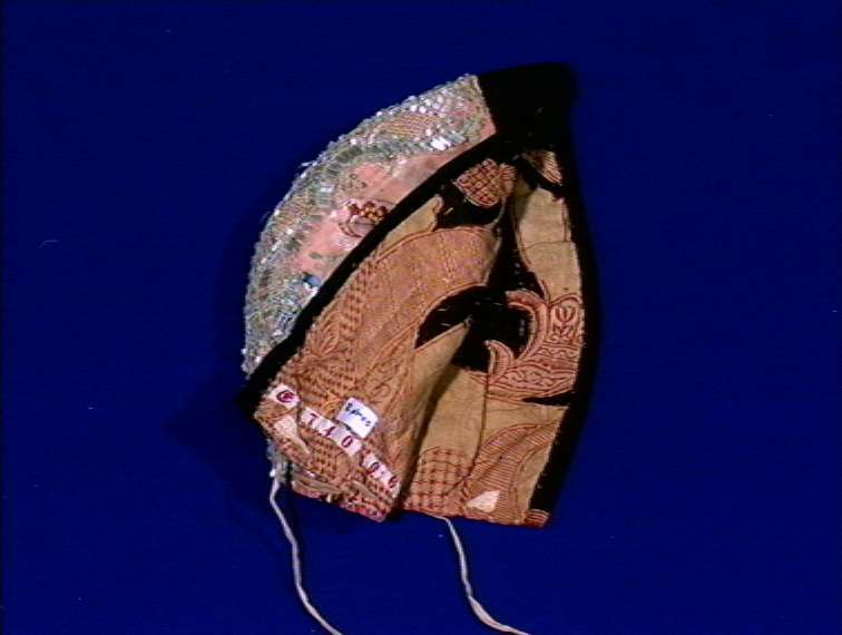 Tobladlue fra Røros, innside